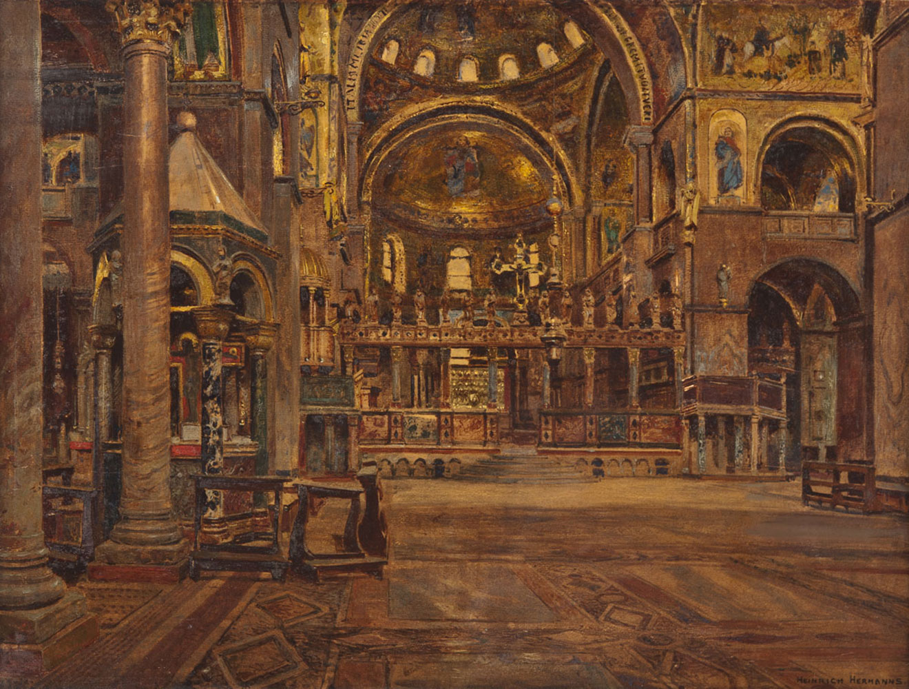 San Marco in Venedig. Öl auf Malkarton, 45.5 x 60 cm